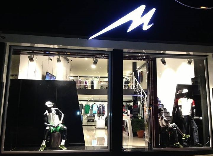 A Merooj shop